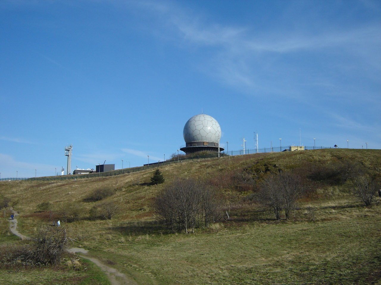 Ehemalige militärische Radarstation auf dem Berg Wasserkuppe in der Rhön.